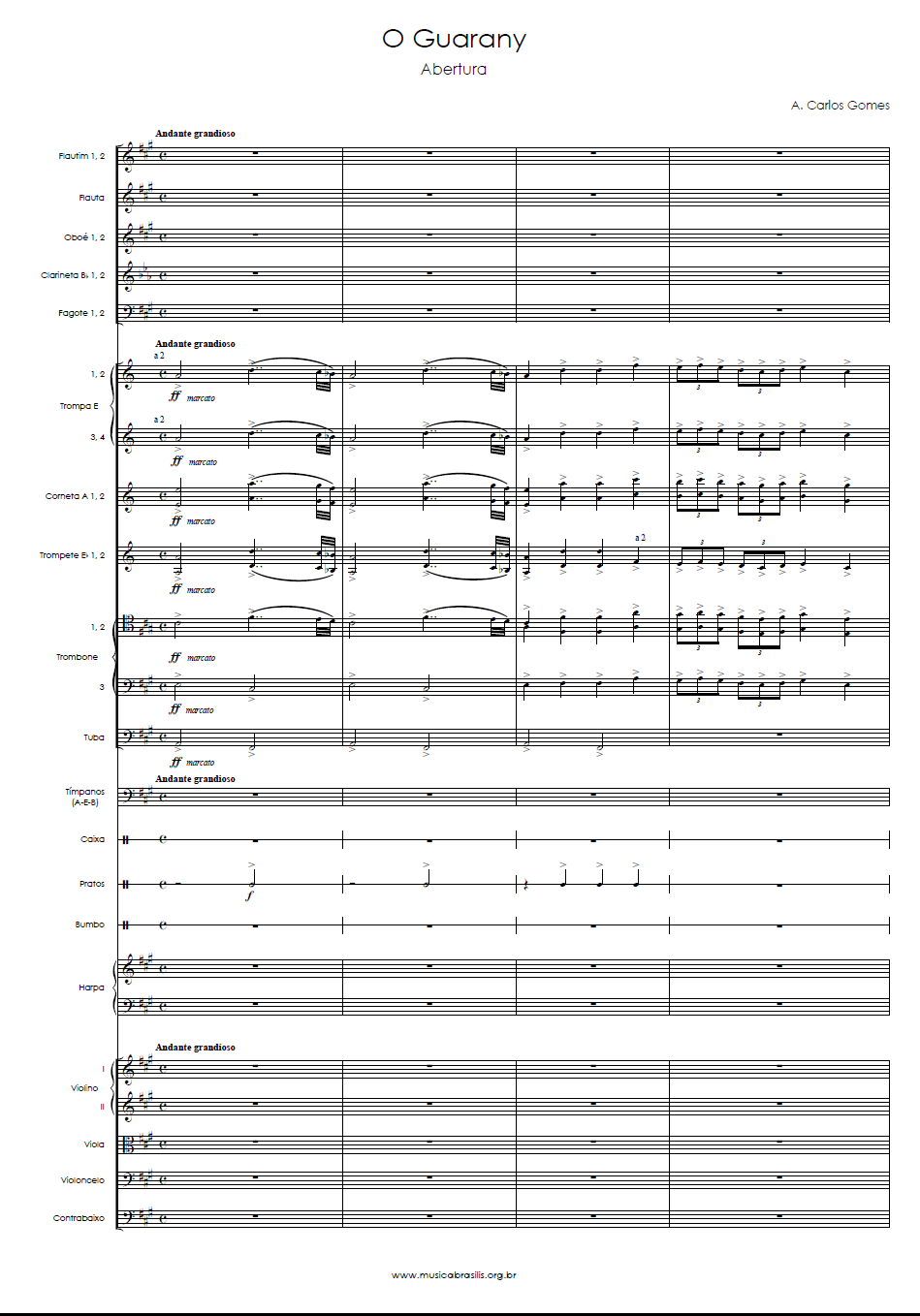 Partitura